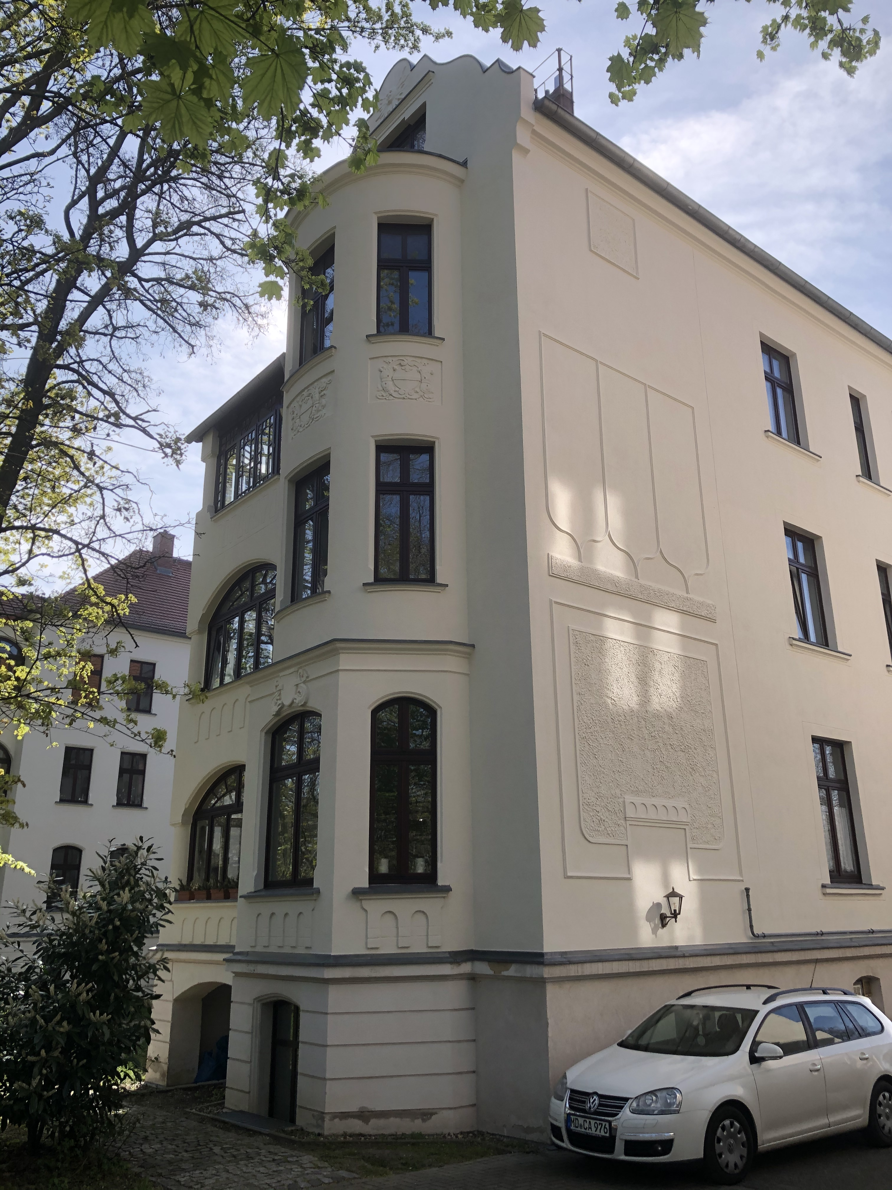 Benediktinerstraße 2